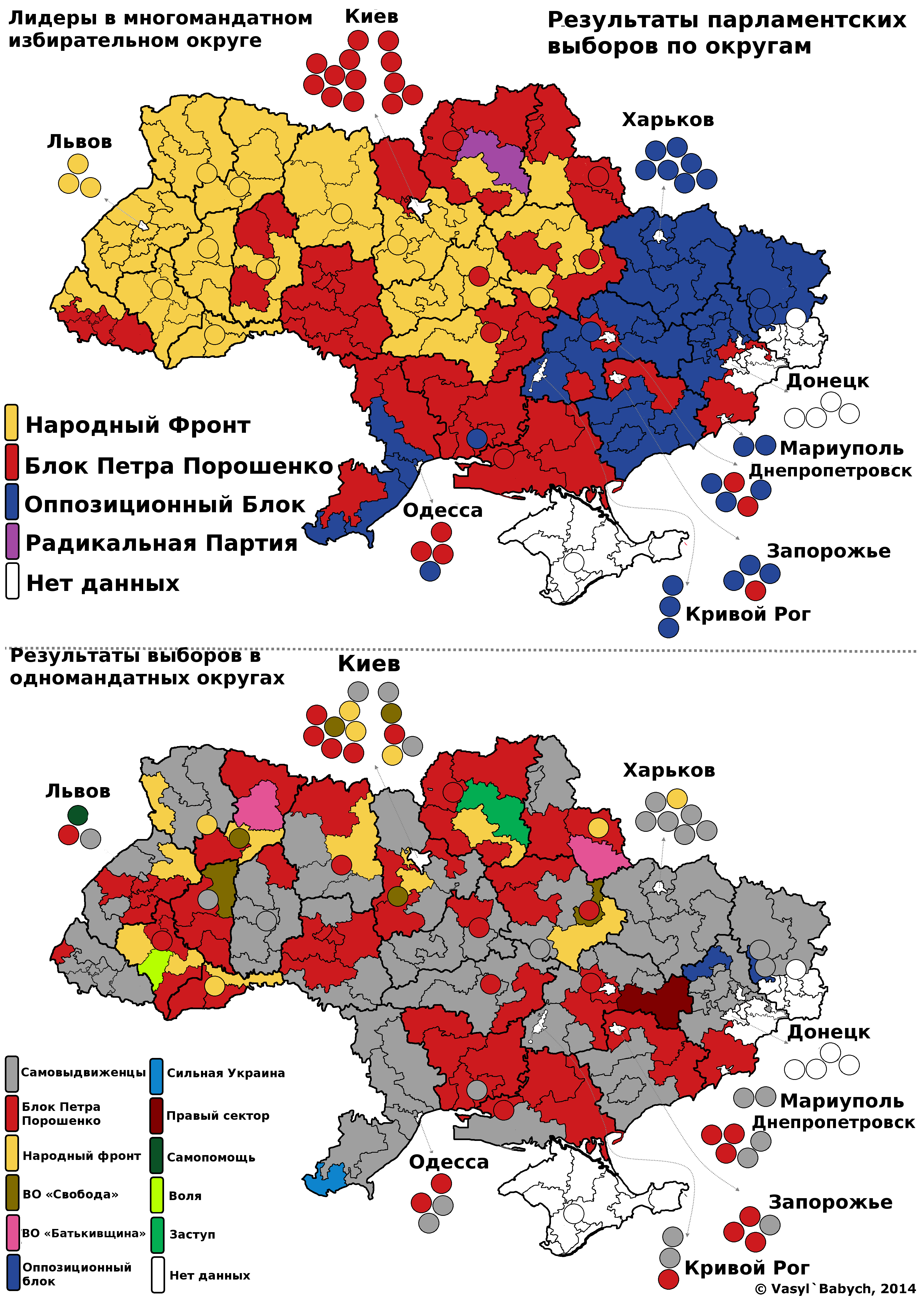 Русифицированная карта результатов парламентских выборов в Украине 2014 года.